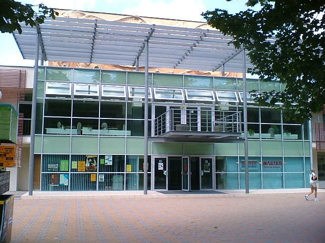 Miejskie Ośrodek Kultury - Głogów